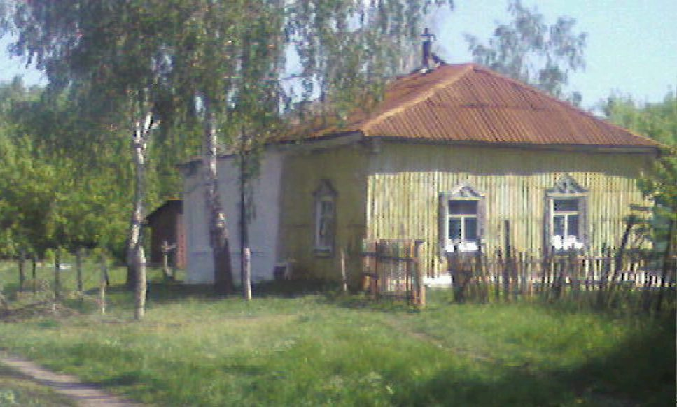 Типичный сельский дом (дом был построен Бахтиным М.С.). ХХ век. апрель 2010 г.